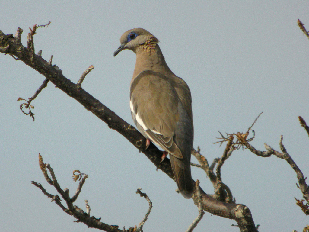 West Peruvian dove (Zenaida meloda), Santa Elana, Ecuador